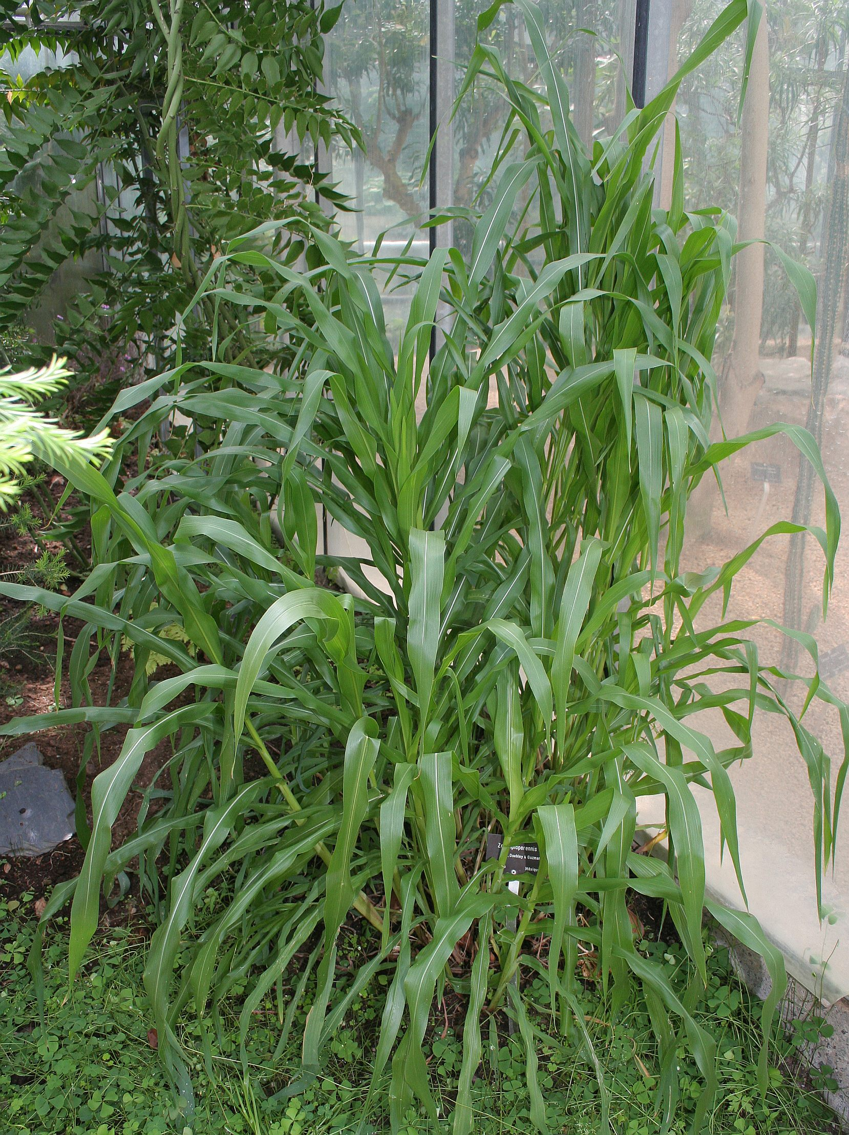 Zea diploperennis, Conservatoire botanique national de Brest, France, Juin 2007